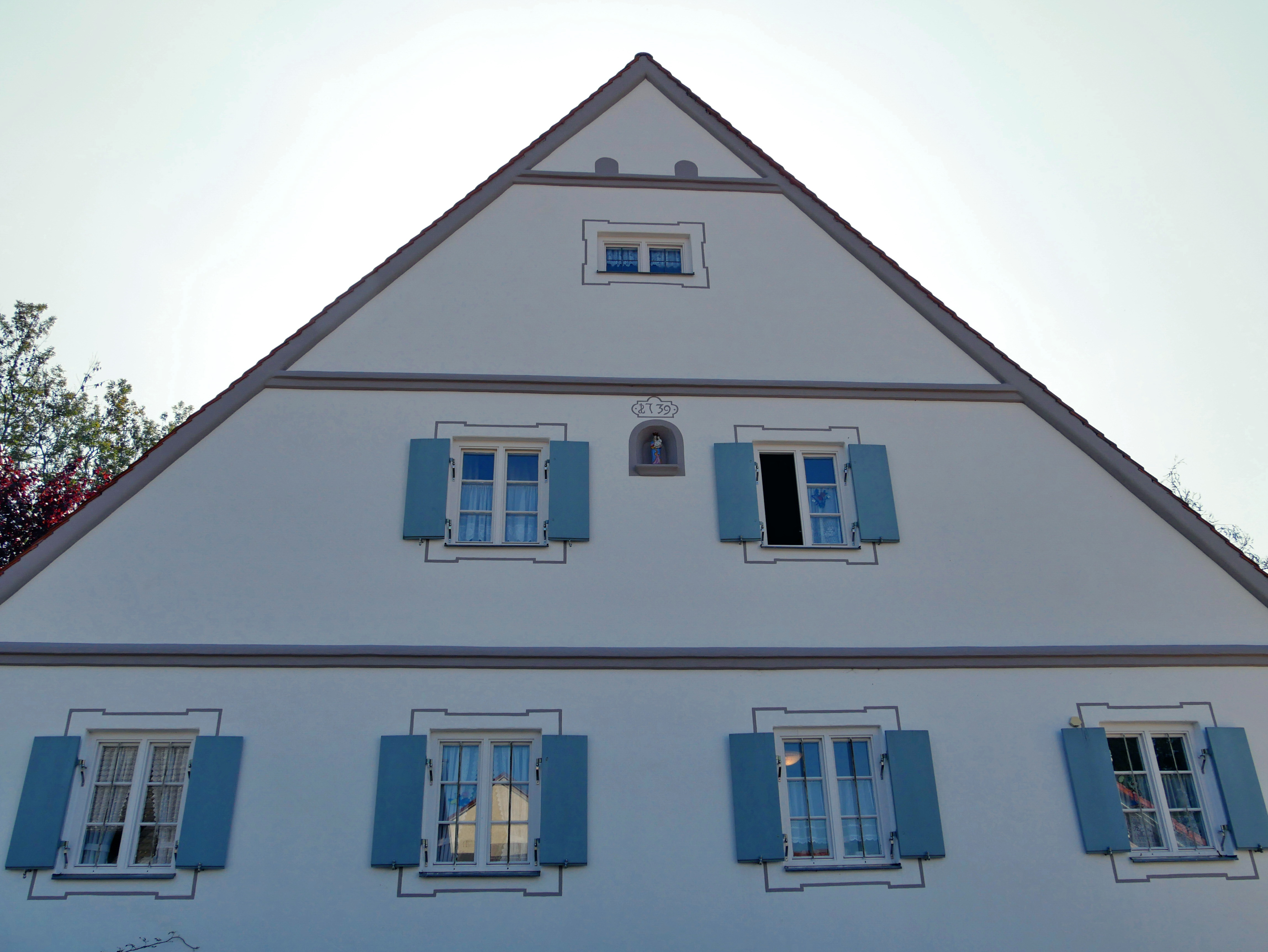 Beschr: Moorenweis, Ortsteil Steinbach, Steinbach 29: Ehemaliges Bauernhaus aus dem Jahr 1739. Ansicht von N